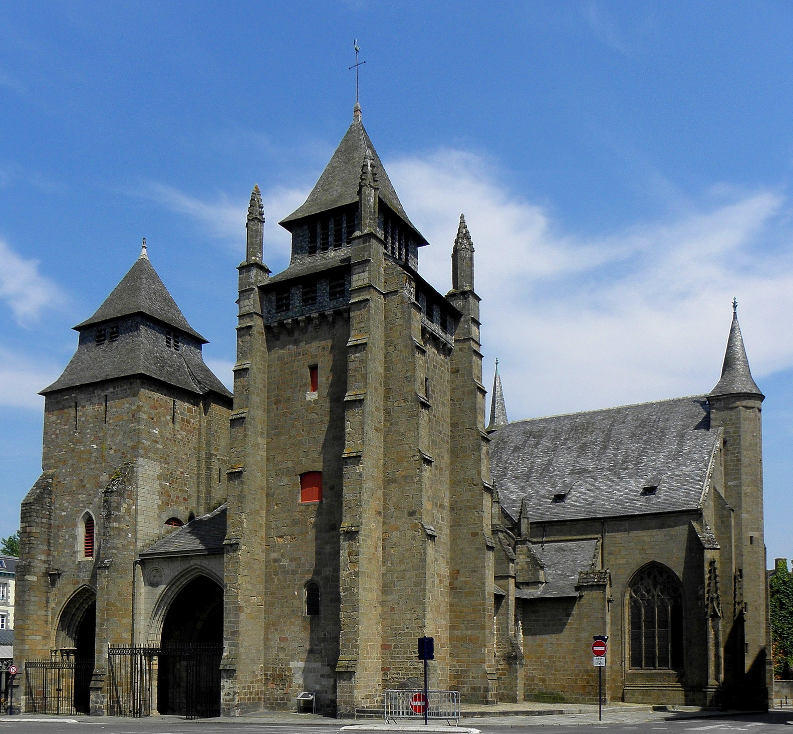 Façade occidentale et flanc sud de la nef de la cathédrale Saint-Étienne de Saint-Brieuc (22).